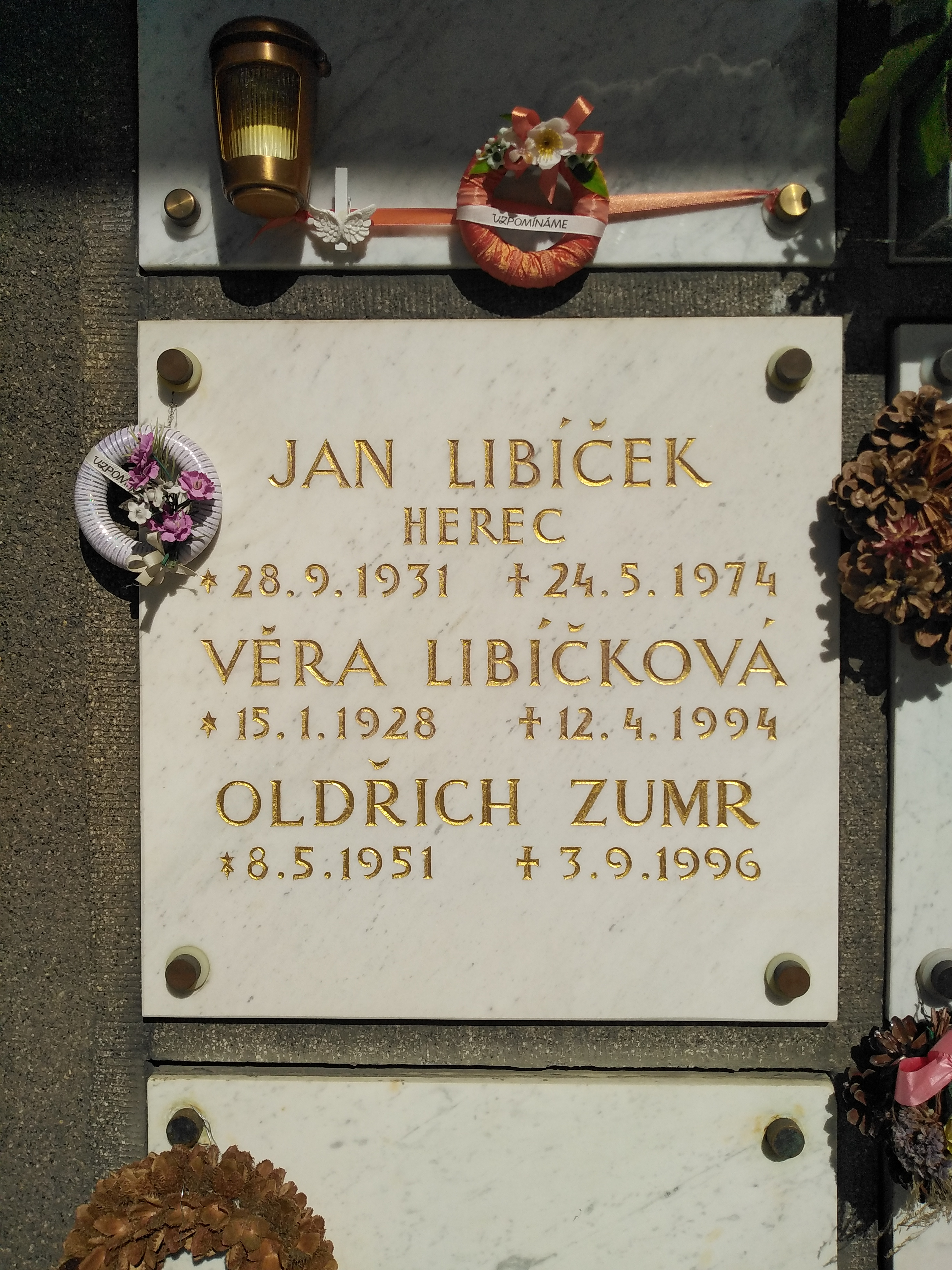 HROB